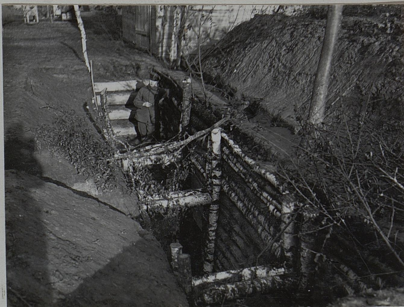 Befestigte Unterkünfte (Fuchsloch) im Norden von Alexandrowka